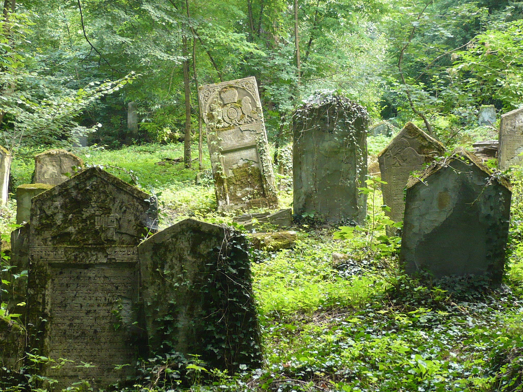 Przemyśl, nowy cmentarz żydowski